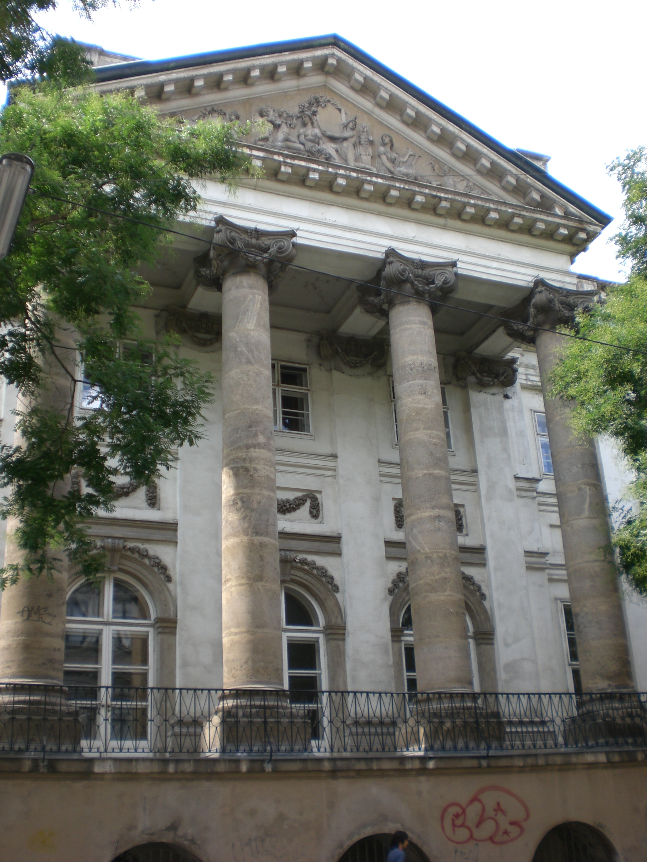 Palais Rasumofsky von der Geusaugasse aus gesehen